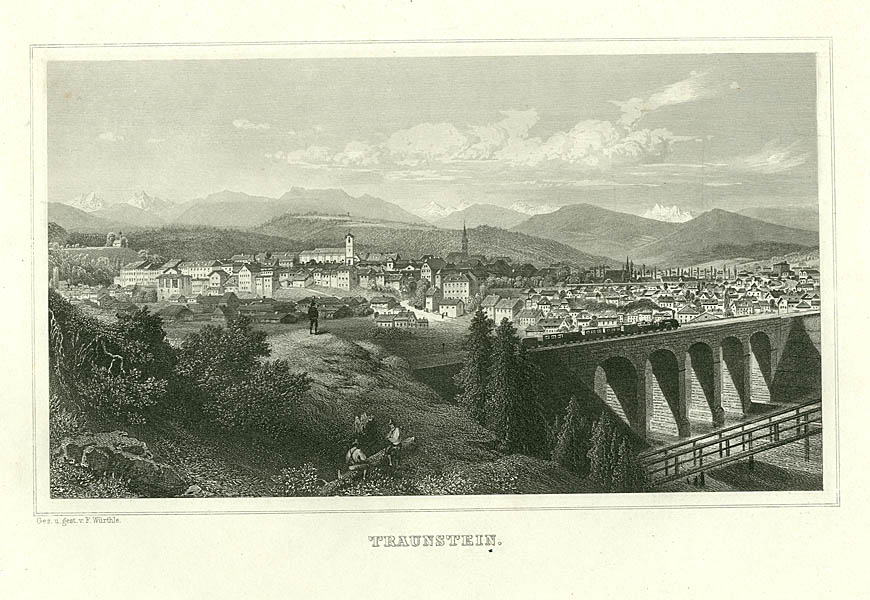 Traunstein, Ansicht mit Eisenbahnbrücke, Stahlstich, gezeichnet und gestochen von F. Würthle, um 1880 Aus: Das Königreich Bayern. Seine Denkwürdigkeiten und Schönheiten, 1879/81.